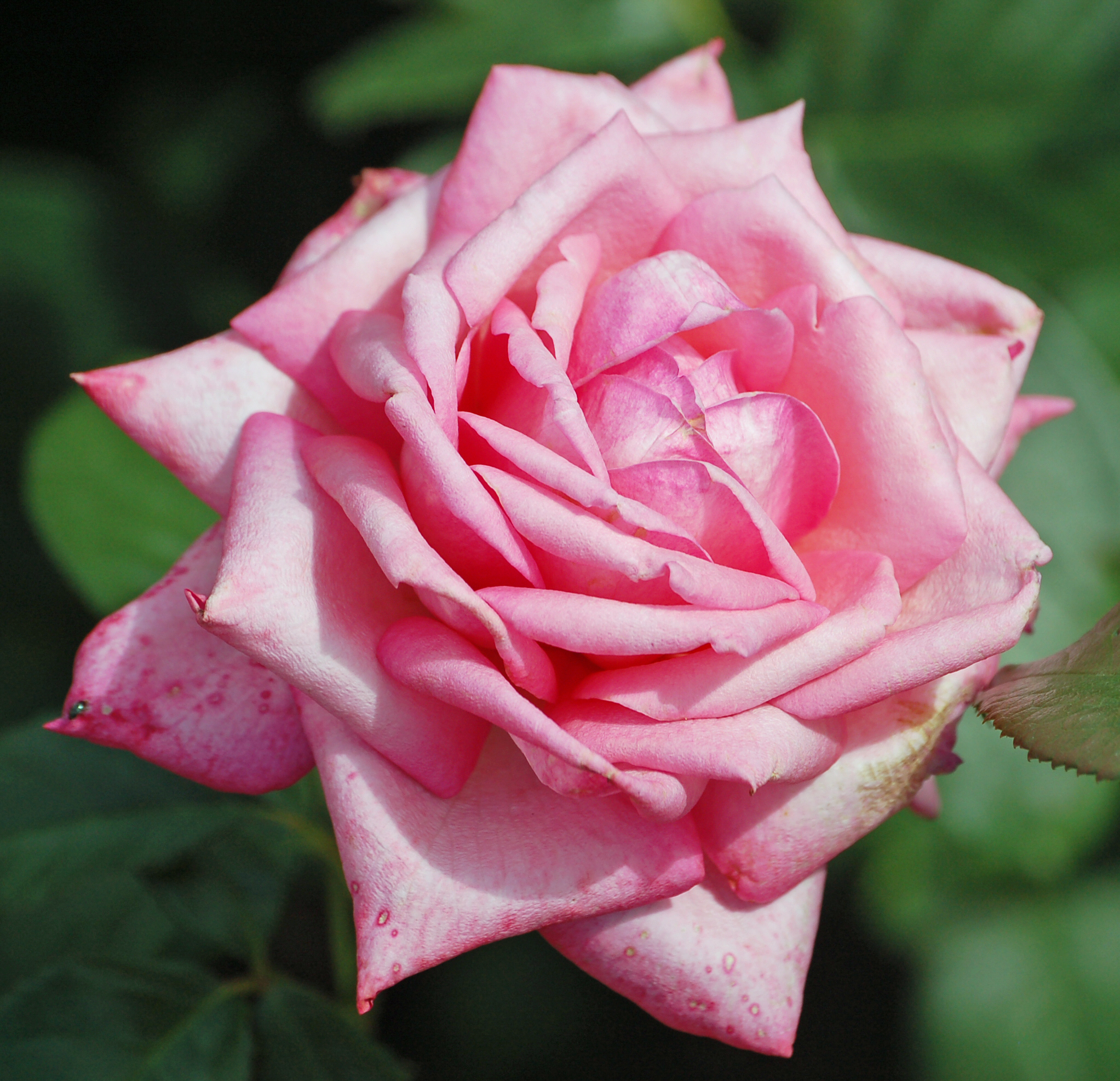 Edelrose Wedding Bells (Kordes 2010).